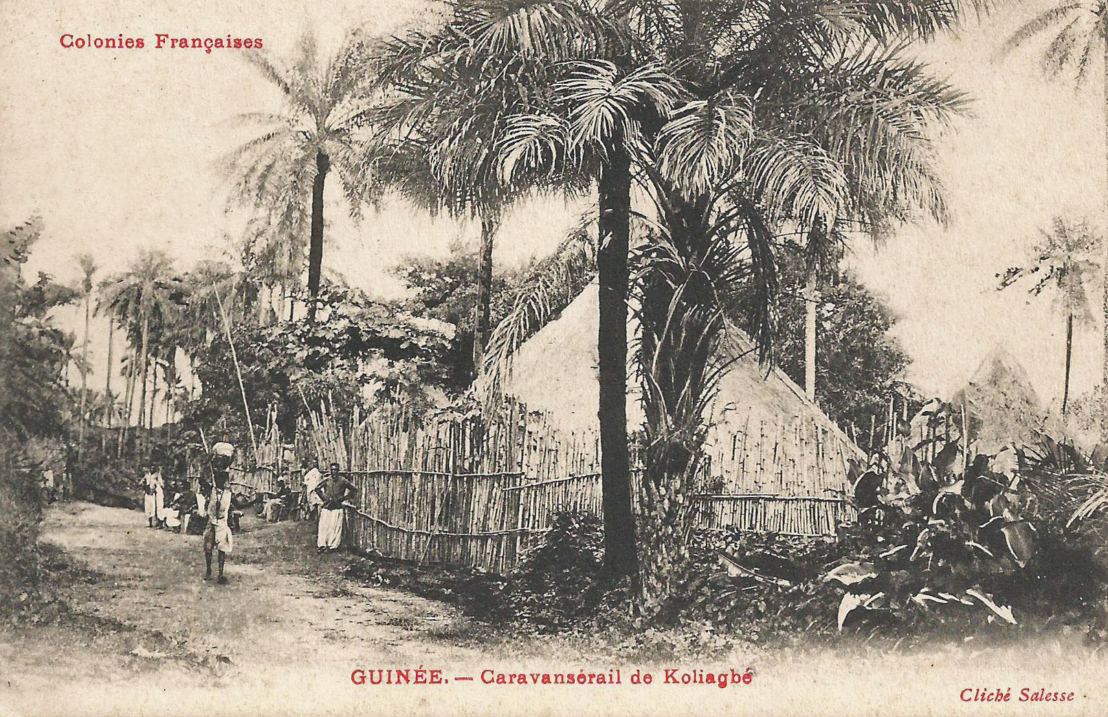 Caravansérail de Koliagbé. Cliché Salesse. Colonies françaises. Guinée